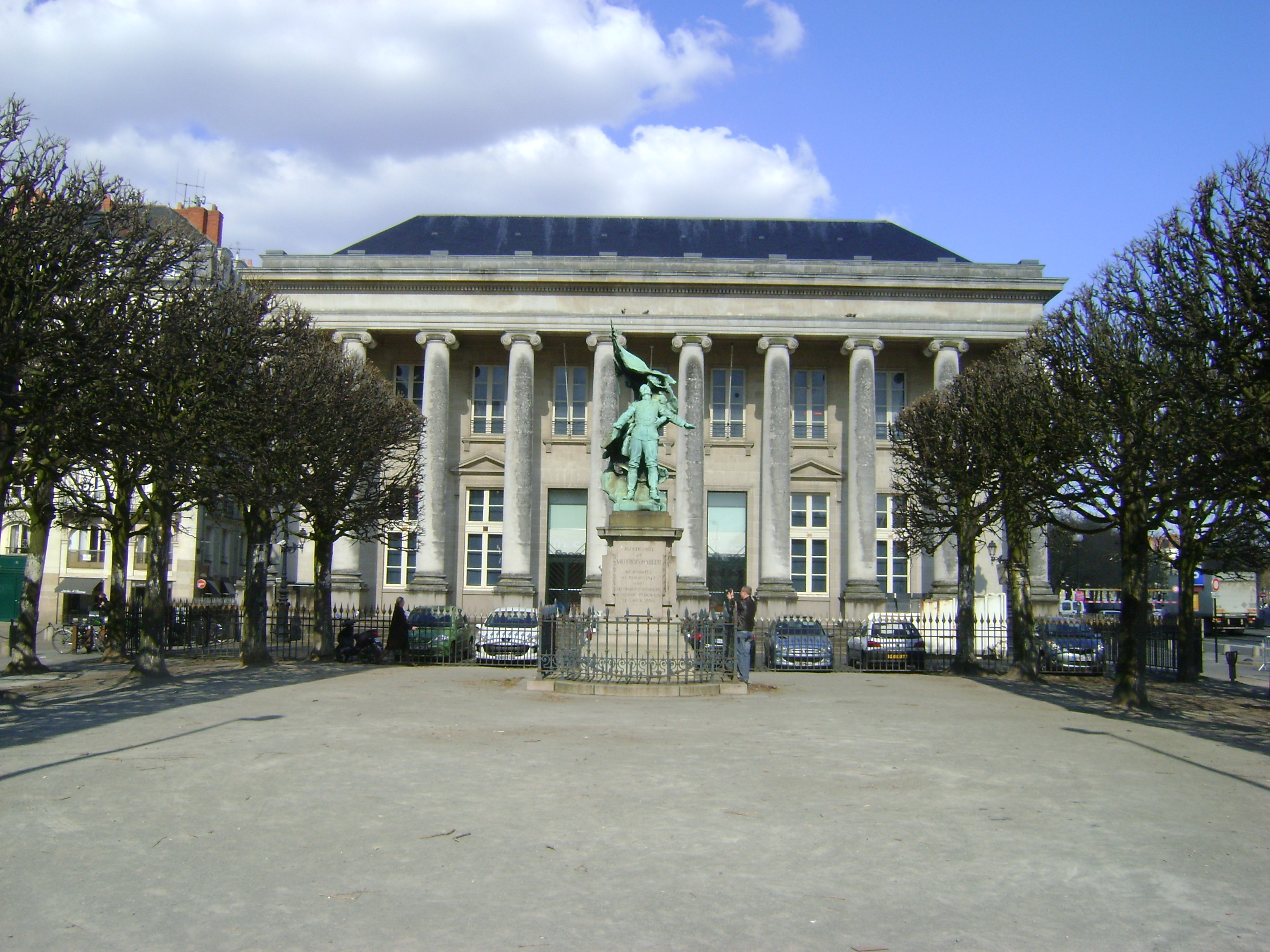 Palais de la Bouse, Nantes. Façade occidentale en 2010. .